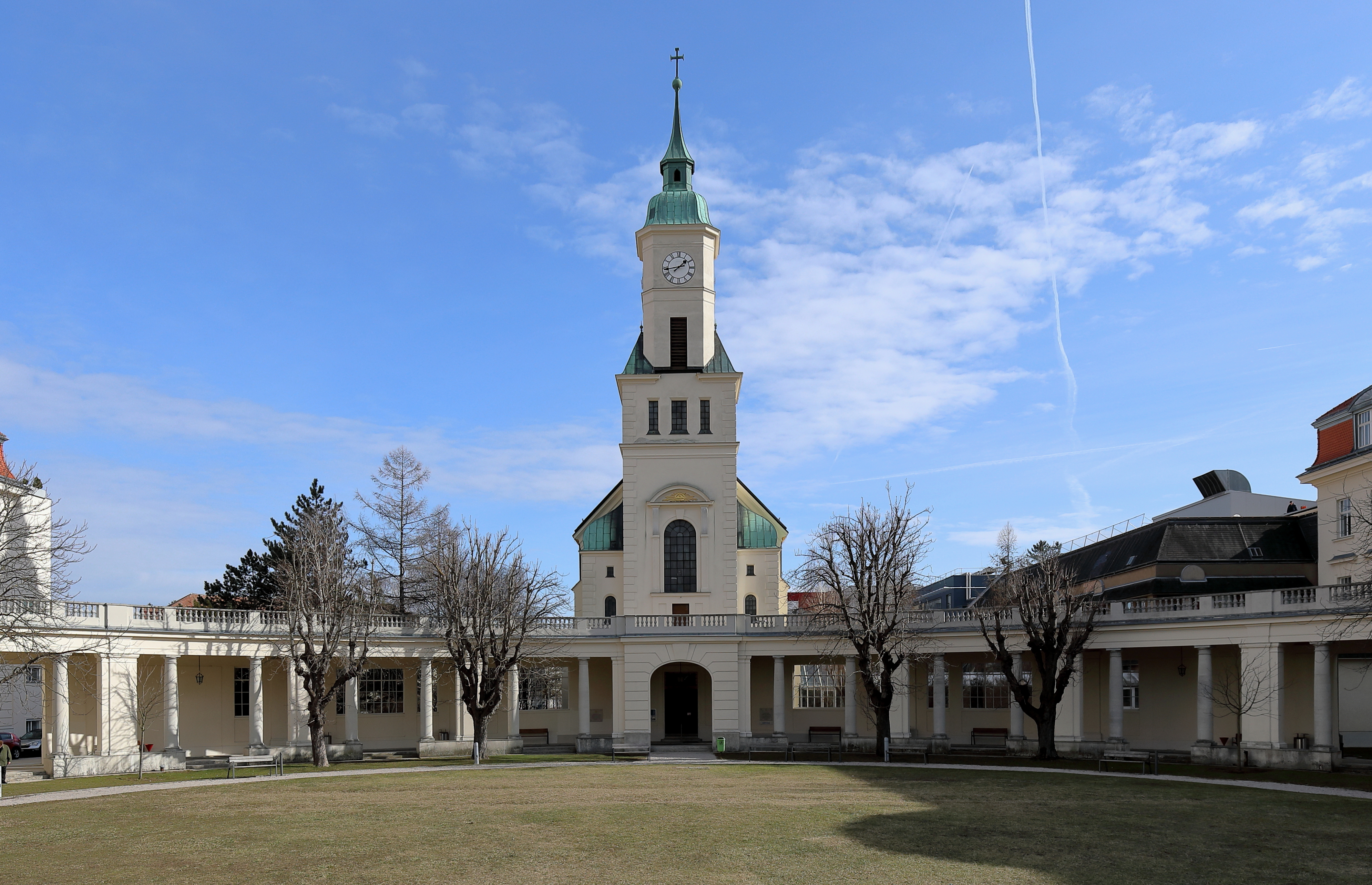 Spitalskirche des Orthopädischen Spitals Speising im 13. Wiener Bezirk Hietzing. Die dem hl. Josef geweihte Kirche wurde ursprünglich als Teil einer Waisenhausanstalt von 1908 bis 1912 von den Schulbrüdern errichtete.